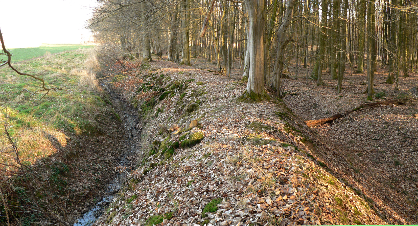 Schaumburger Landwehr westlich von Wiedensahl